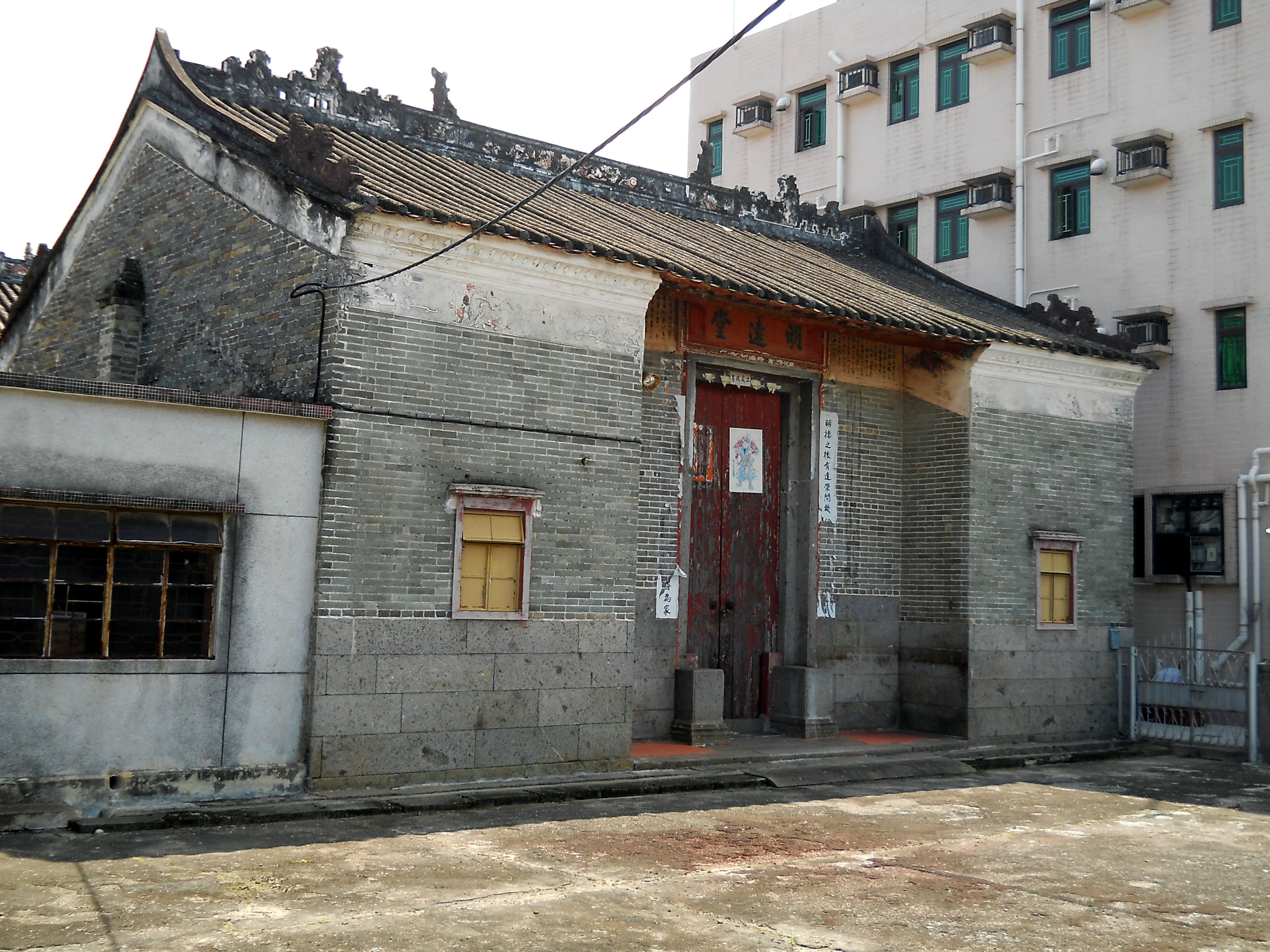 中文（香港）: 新田蕃田村明遠堂